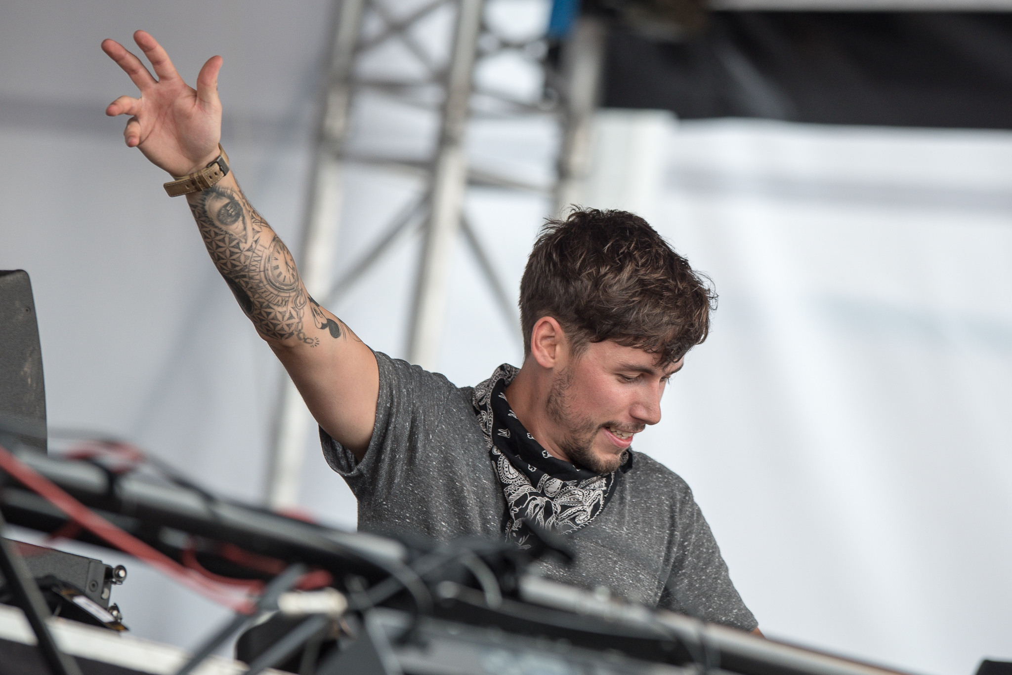 Chris Stritzel,Festival,Konzert,Le Shuuk,Livekonzert,Livemusik,Mainstage,Musik,Open Beatz 2016